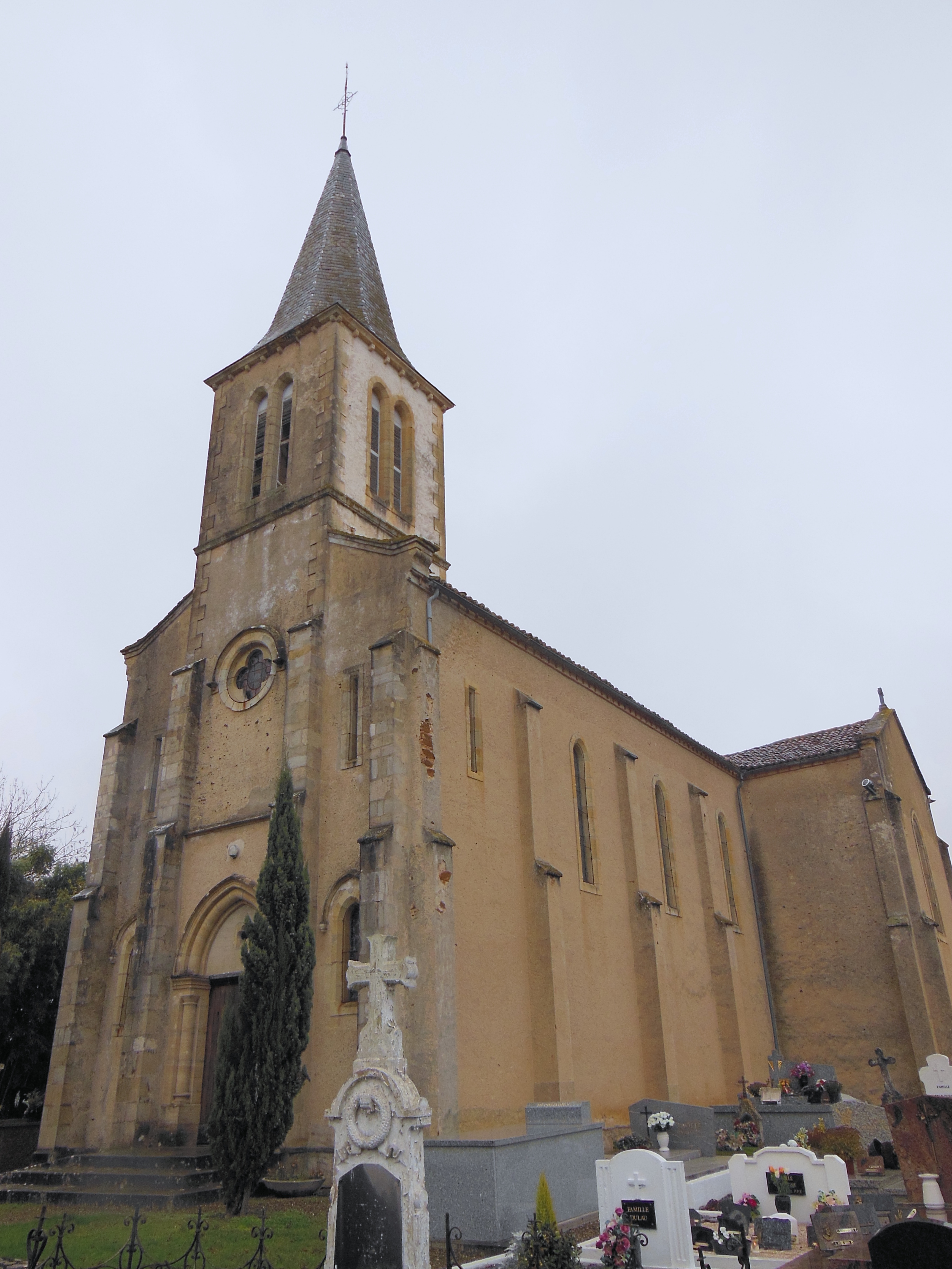 Église Saint-Loup de Lacrabe (Landes, France)